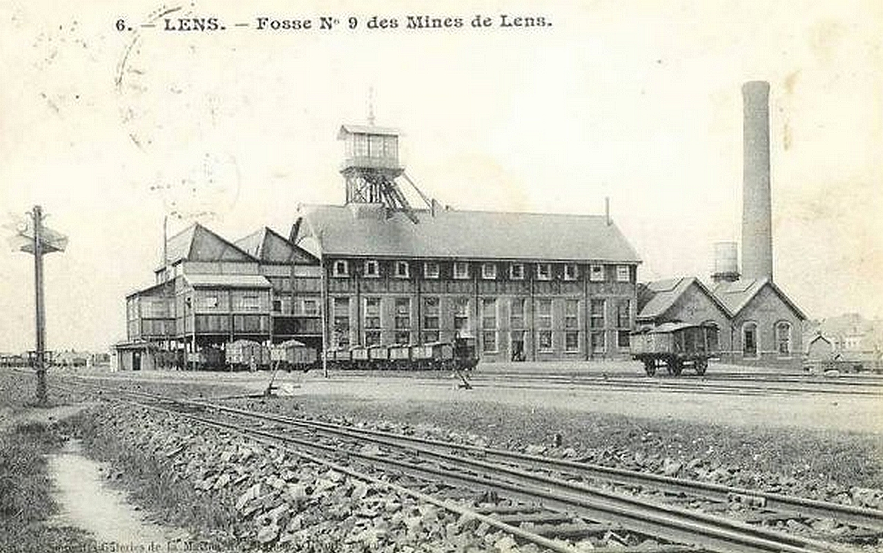 La fosse n° 9 de la Compagnie des mines de Lens était un charbonnage du bassin minier du Nord-Pas-de-Calais constitué d'un seul puits situé à Lens, Pas-de-Calais, Nord-Pas-de-Calais, France.